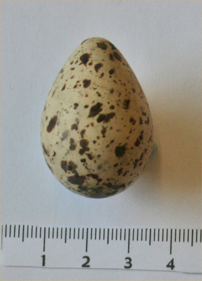 Rantasipin muna V. Vuorisalon ja Y. Karran kokoelmasta. Lahjoitettu 20.1 1947 Kokemäen Yheiskoululle. Muna poimittu keravalta v.-31